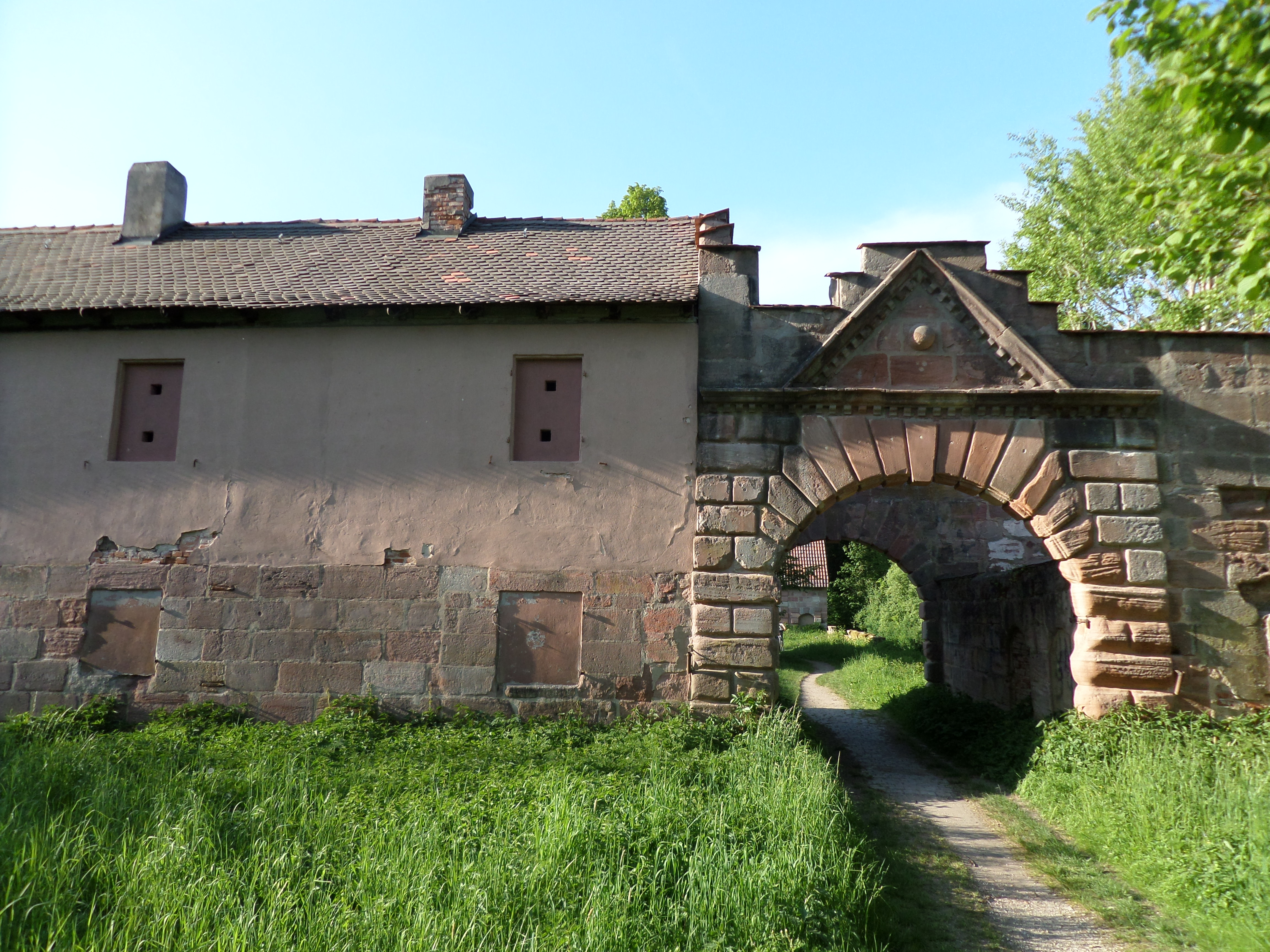 Oberbürger Straße 1 - Ehemaliges Wasserschloss Oberbürg - Umfassungsmauern des ehemaligen Herrenhauses, Sandstein, im Kern Anfang 16. Jahrhundert, um 1563 und um 1700 erweitert - ehemaliger Wirtschaftshof, dreiflügeliger, erdgeschossiger Sandsteinquader- und Ziegelbau mit Satteldach und rustizierten Toren, im Kern um 1563, 17. Jahrhundert erweitert, 1966 teilweise wiederaufgebaut - Teile der Umfassungsmauern mit Rundtürmen und Torpfeilern, Sandstein, 16. Jahrhundert. - D-5-64-000-1410